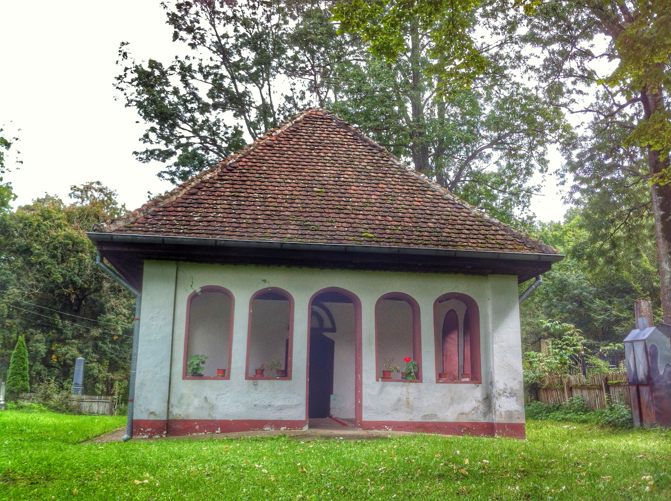 Црква брвнара у Крњеву саграђена средином 18-тог века. У њој је била једна од најстаријих школа у Србији.